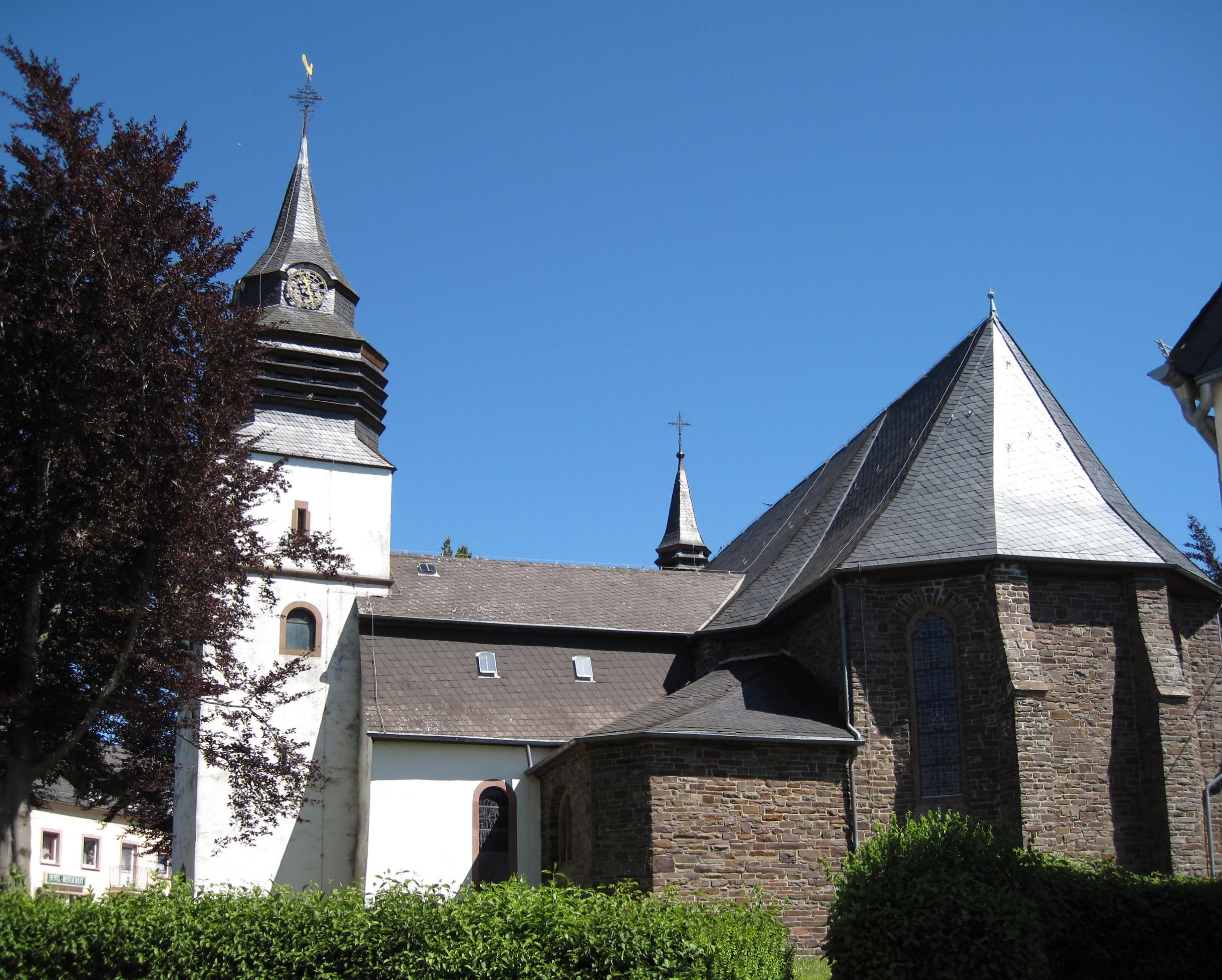 Katholische Pfarrkirche St. Maria Magdalena in Arzfeld